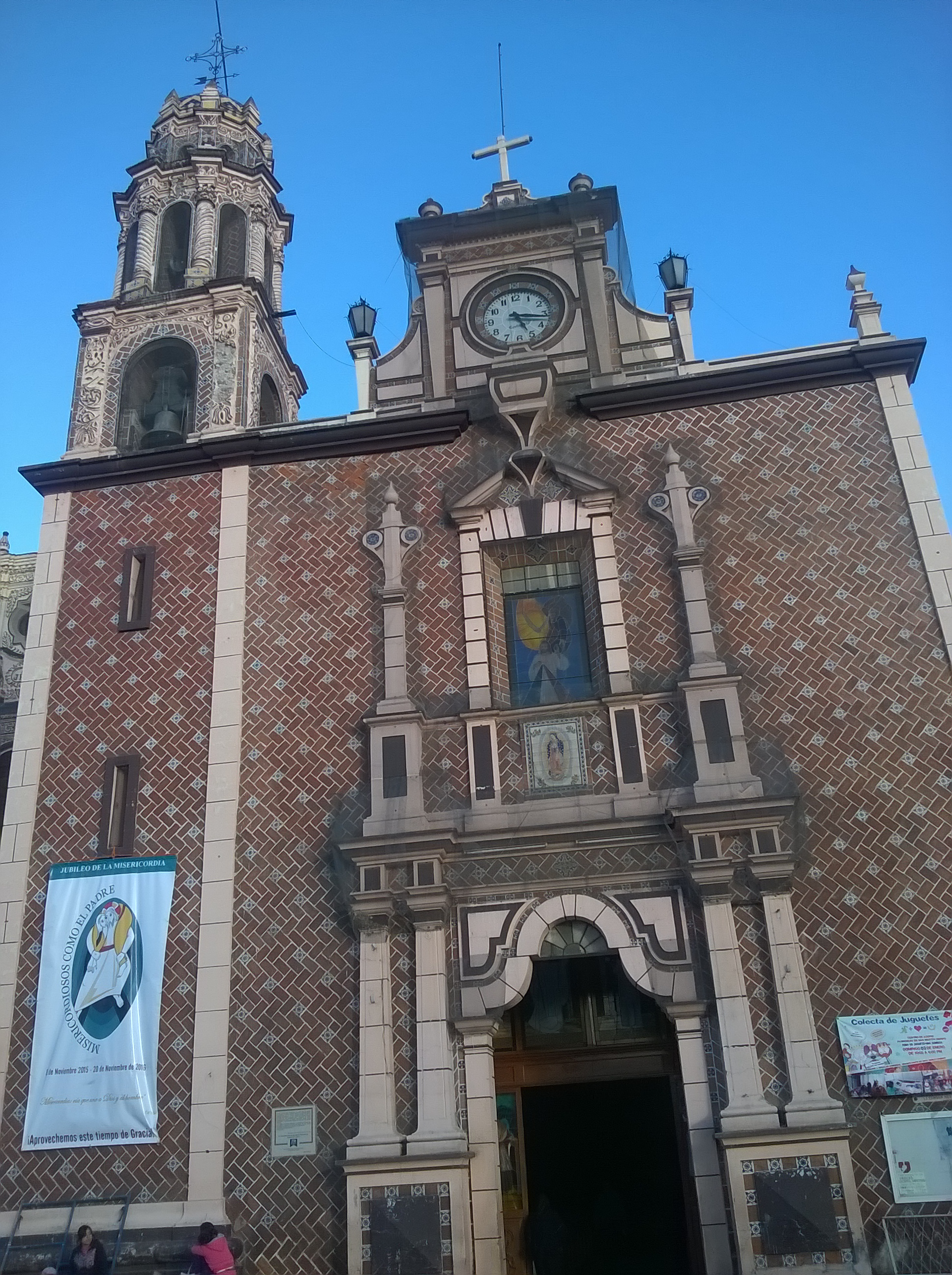 Iglesia de San Martín Obispo en San Martín Texmelucan, Puebla